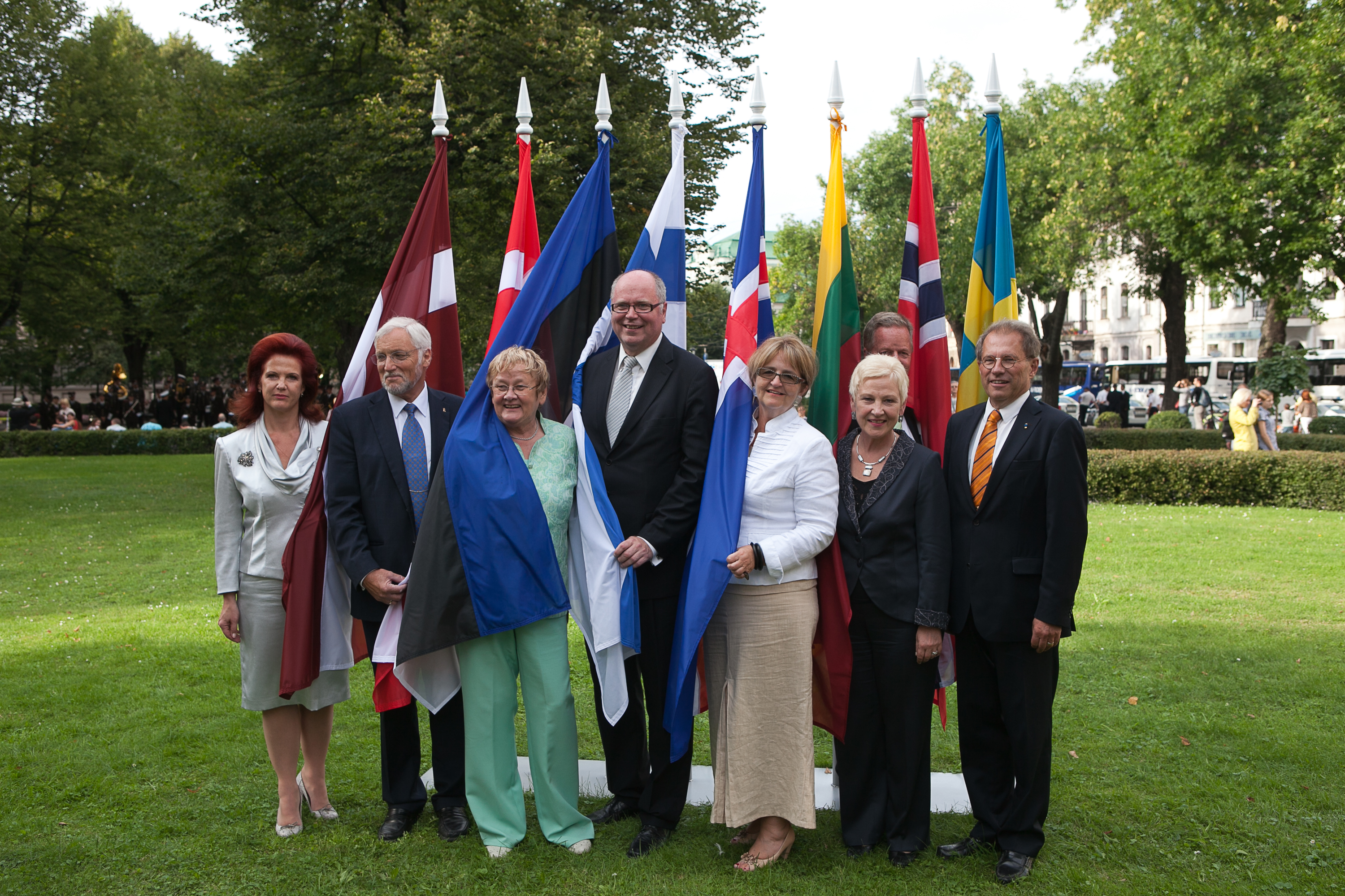 2011.gada 21.augusts. Baltijas un Ziemeļvalstu parlamentu priekšsēdētāji kopā ar Augstākās padomes deputātiem stādīja kokus Jēkaba laukumā pie Saeimas nama par godu Latvijas Republikas valstiskās neatkarības atjaunošanas 20.gadadienai. Attēlā Baltijas valstu un Ziemeļvalstu parlamentu priekšsēdētāji pie savu valstu nacionālajiem karogiem. No kreisās Saeimas priekšsēdētāja Solvitas Āboltiņas, Dānijas parlamenta priekšsēdētājs Tors Pēdersens (Thor Pedersen), Igaunijas parlamenta priekšsēdētāja Ene Ergma (Ene Ergma), Somijas parlamenta priekšsēdētājs Ēro Heinaluoma (Eero Heinaluoma), Islandes parlamenta priekšsēdētāja Austa R. Jouhannesdoutira (Ásta R. Jóhannesdóttir), Lietuvas parlamenta priekšsēdētāja Irena Degutiene (Irena Degutienė), Norvēģijas parlamenta ģenerālsekretārs Hanss Bratesto (Hans Brattestå), Zviedrijas parlamenta priekšsēdētājs Pērs Vesterbergs (Per Westerberg). Foto: Ernests Dinka, Saeimas Kanceleja